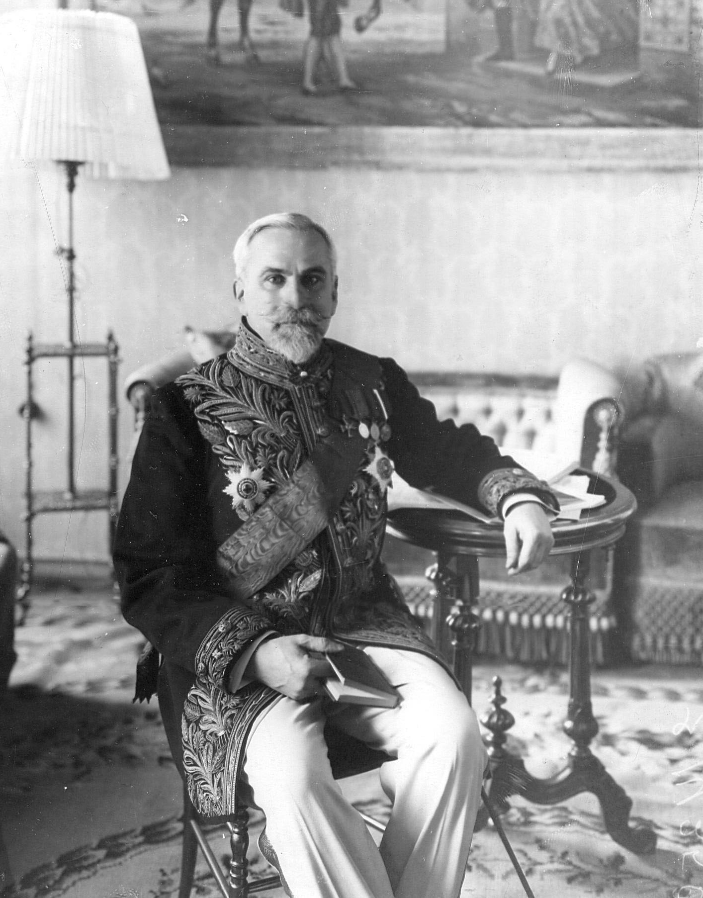 Александр Иванович Лыкошин, товарищ министра внутренних дел, сенатор, член Государственного совета.